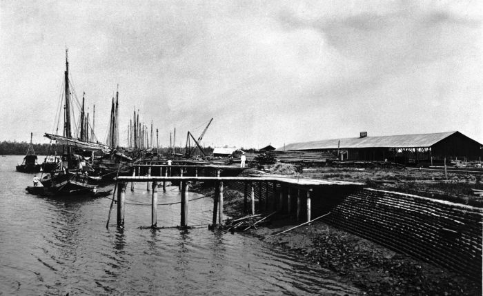 Foto. Haven van Belawan, oostkust Sumatra